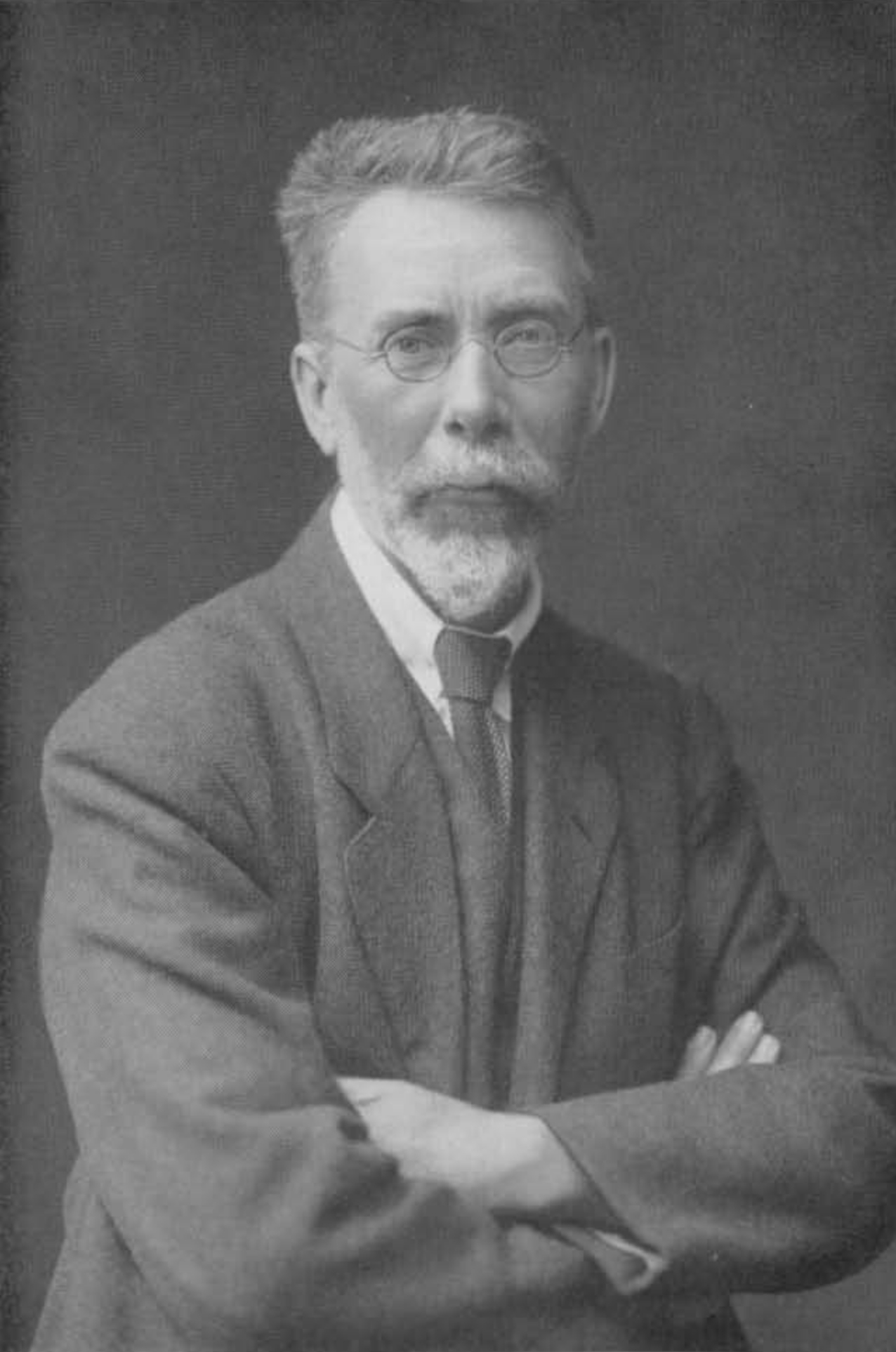 Jean Massart est un botaniste belge, né le 7 mars 1865 à Etterbeek près de Bruxelles et mort le 16 août 1925 à Houx.